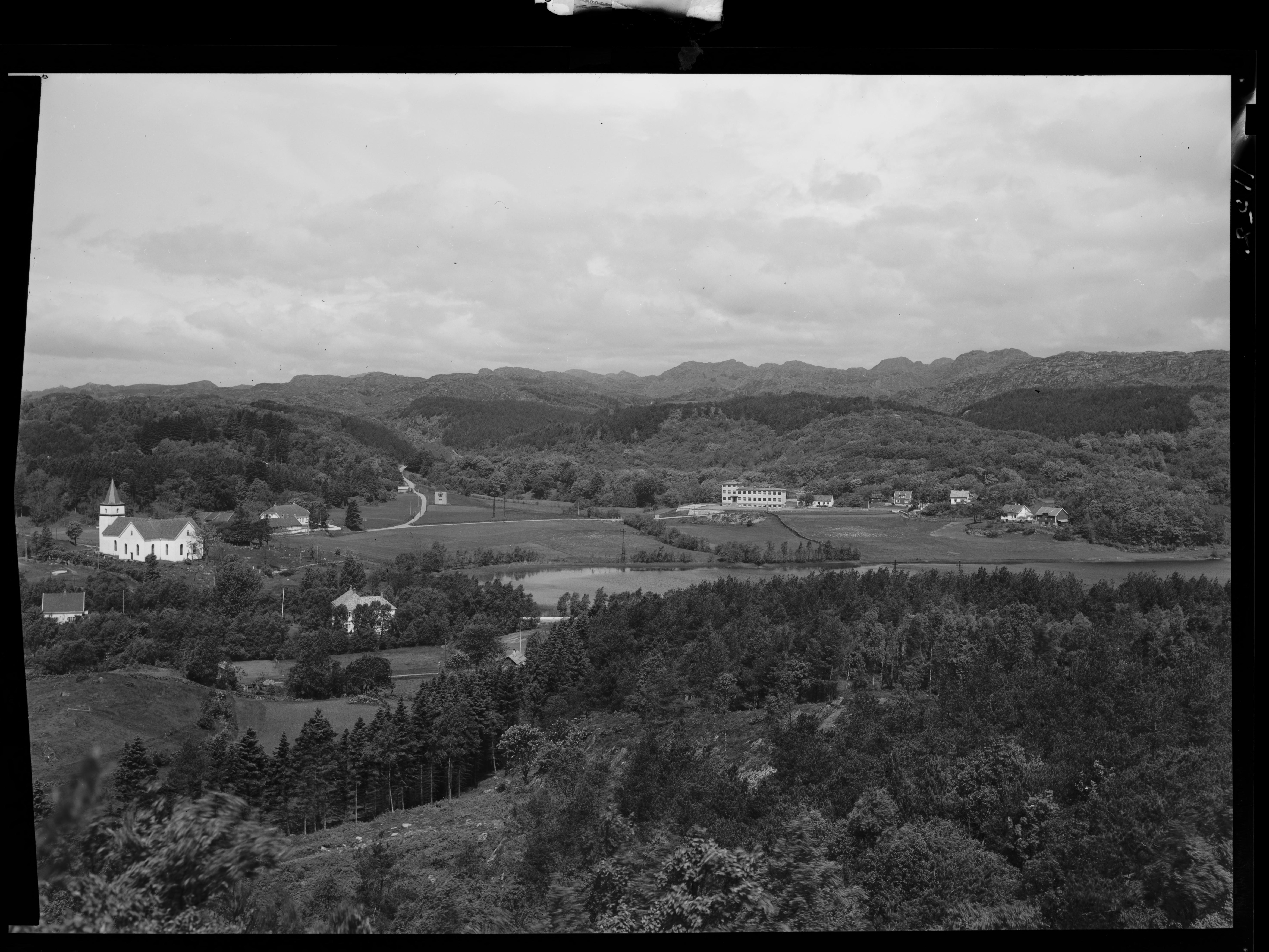 Bildet er hentet fra Nasjonalbibliotekets bildesamling. Anmerkninger til bildet var: Fotograf ukjent Vanse, Farsund, Vest Agder